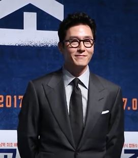 12월 16일 영화 '공조' 제작발표회 현장